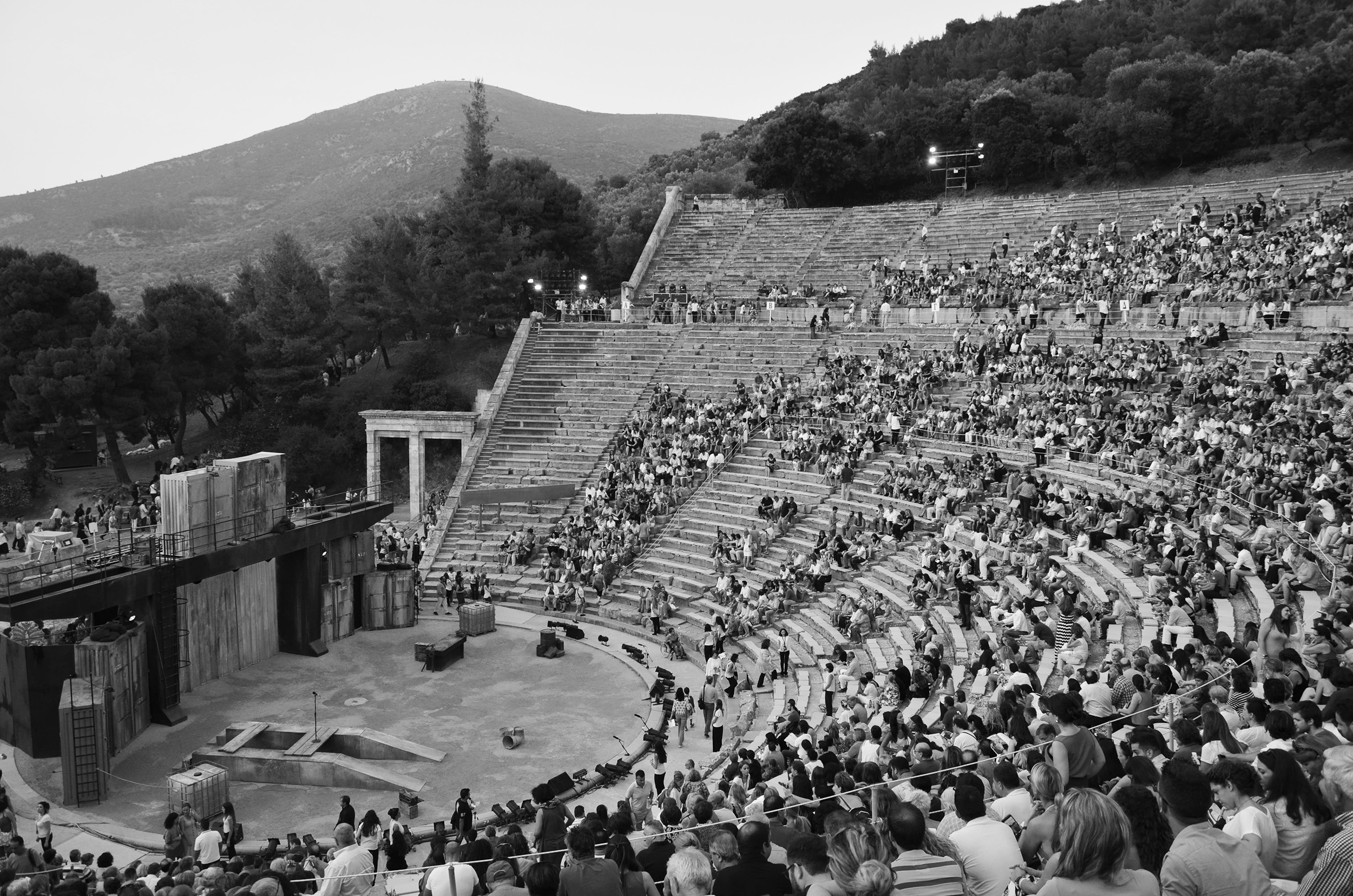 Θέατρο Ασκληπιείου Επιδαύρου«Θέατρο Ασκληπιείου Επιδαύρου»